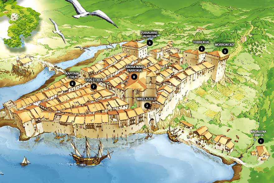 Marea goian zegoenean Errenteriako harresietaraino heltzen zen itsasoa ertaroan. Biteri kalea eta Niessen aldea padura eta itsas-eremuak ziren. Ea Madalena ermitaraino heltzen zen itsasoa. Madalen kalea harresitik kanpo bizi ziren arrantzale pobreen etxeak zeuden, bertaraino heltzen zen itsasoa. Ugarritza-Olibet auzoan ontziola zegoen.